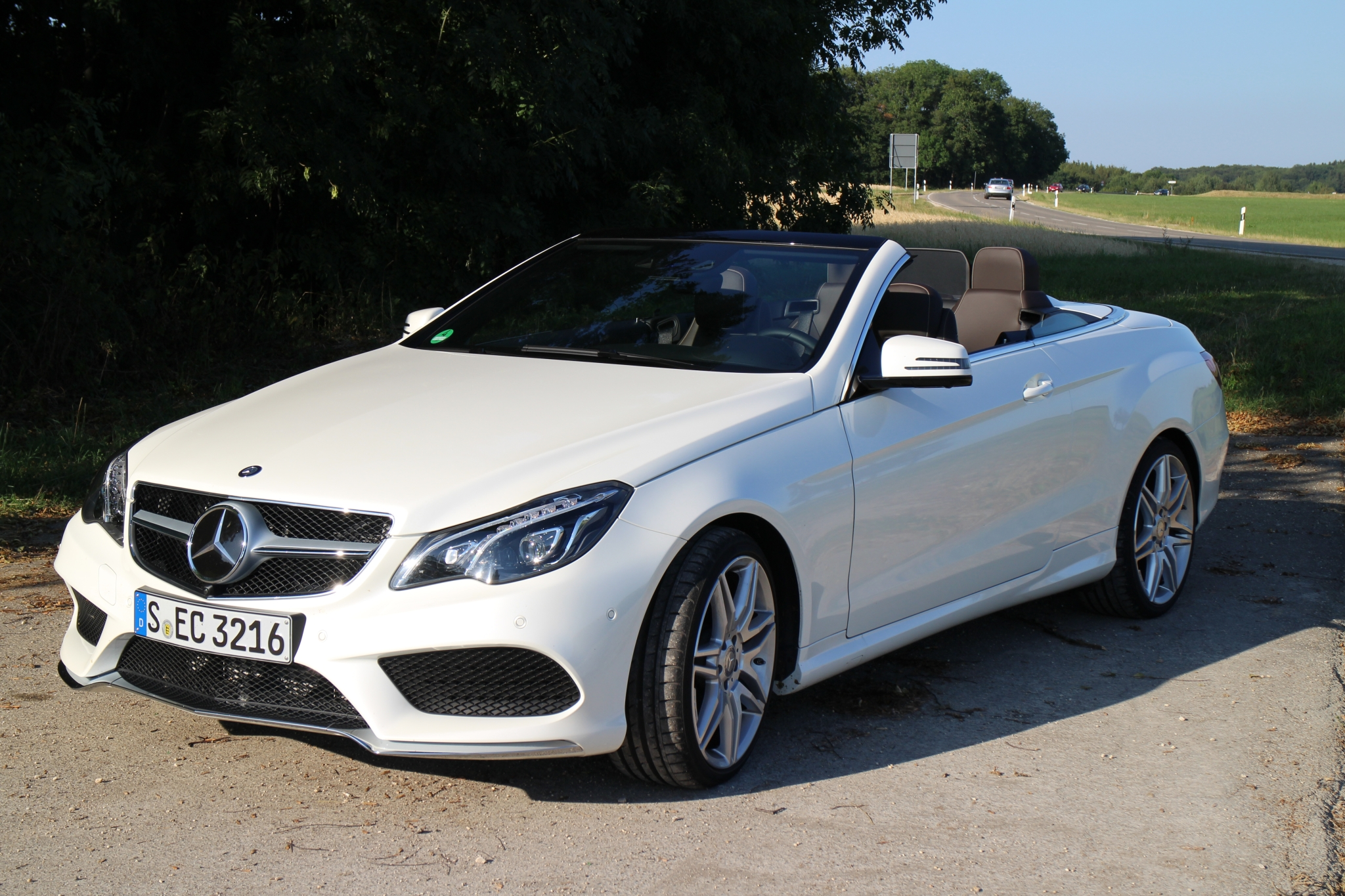 Mercedes E Cabrio 2013 Mercedes E-Klasse Cabrio 2013